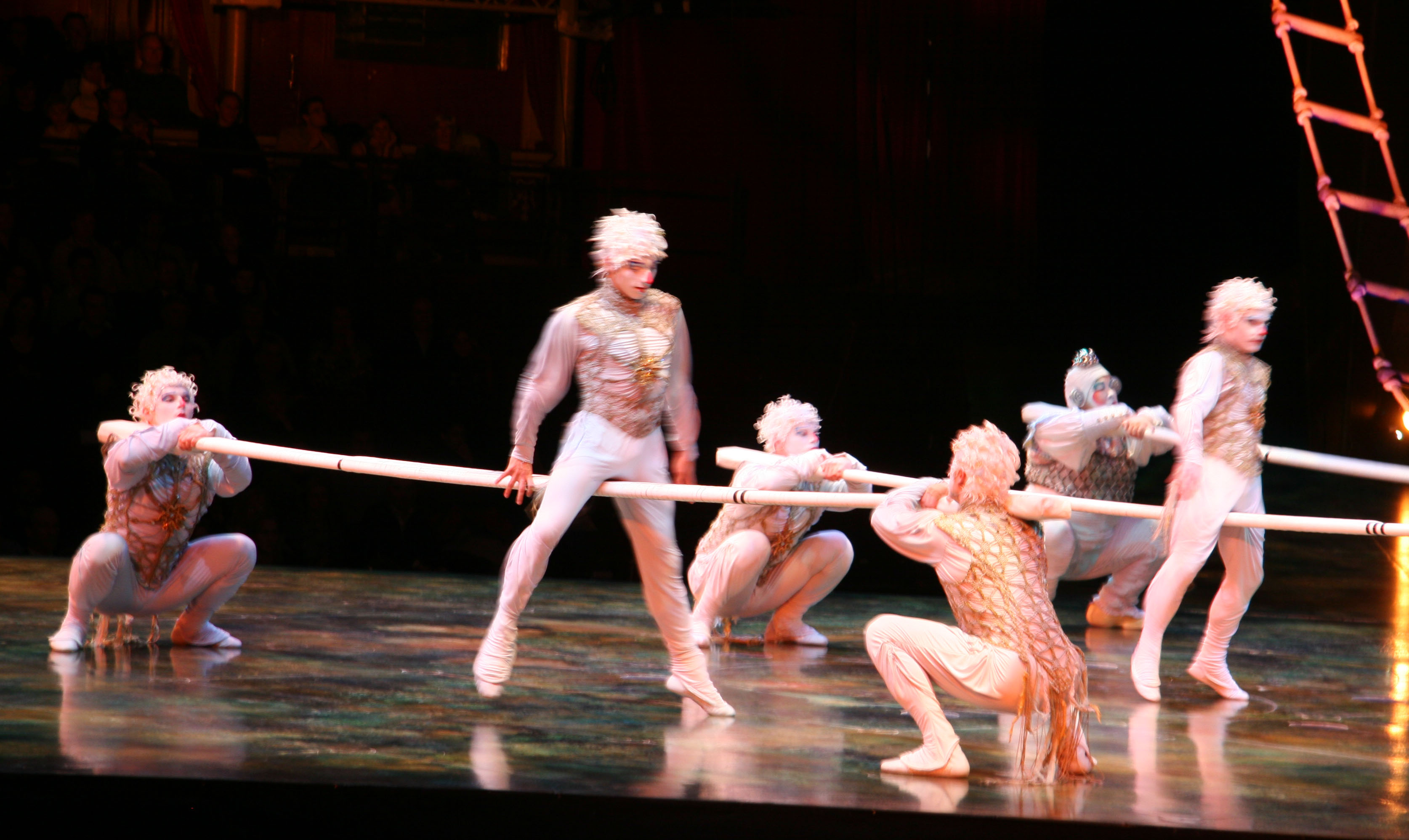 Cirque du Soleil, Alegria, at Royal Albert Hall, London, UK.